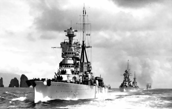 Incrociatore pesante Trento in navigazione di fila